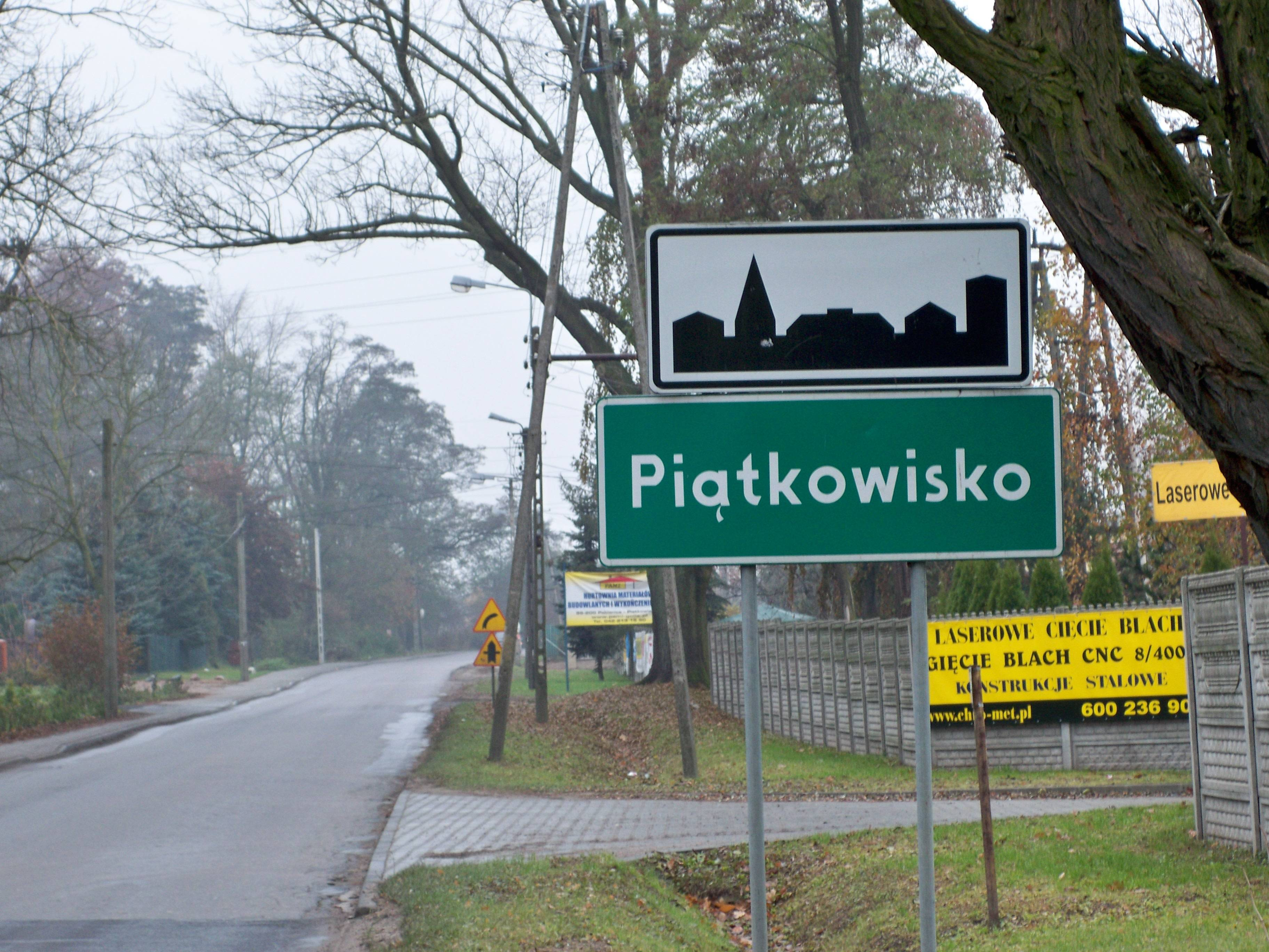 Tablica z nazwą miejscowości Piątkowisko.